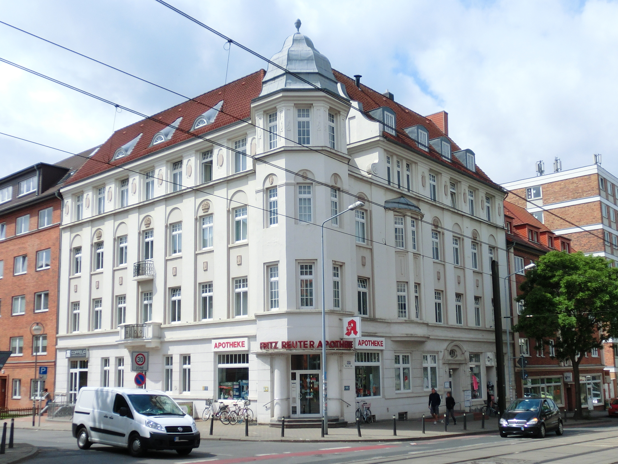 Geschäftshaus (Baudenkmal, Rostock, Doberaner Straße 43b)